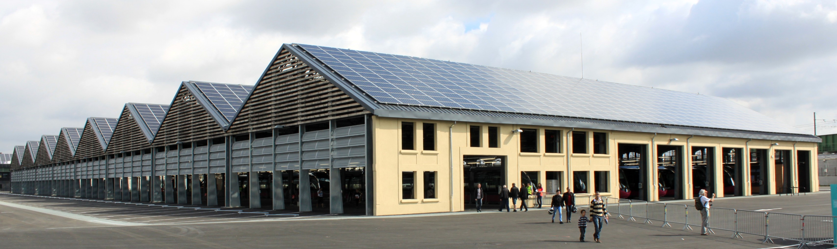 Ateliers du tramway, Côte-d'Or, Bourgogne, France